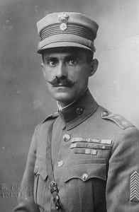 Ο Νικόλαος Πλαστήρας σε φωτογραφία.